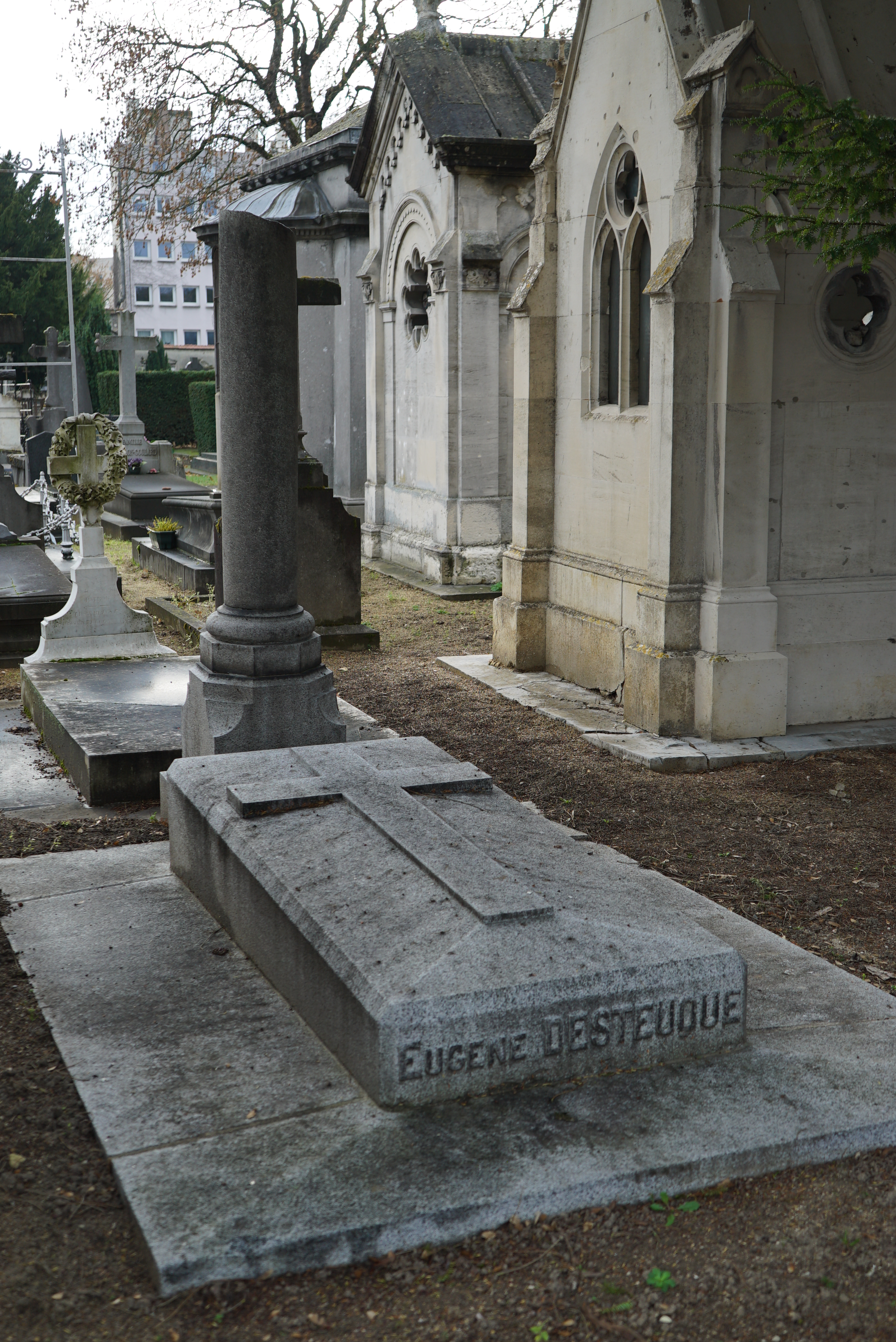 tombe de Eugène Charles et Adèle Desteuque.